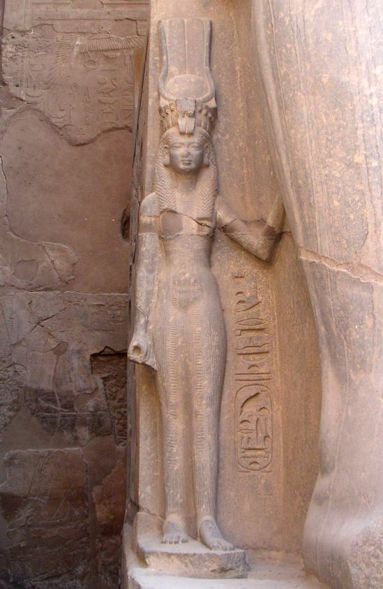 Statue de la grande épouse royale Néfertari au pied d'un des colosses de Ramsès II au temple de Louxor - XIXe dynastie égyptienne